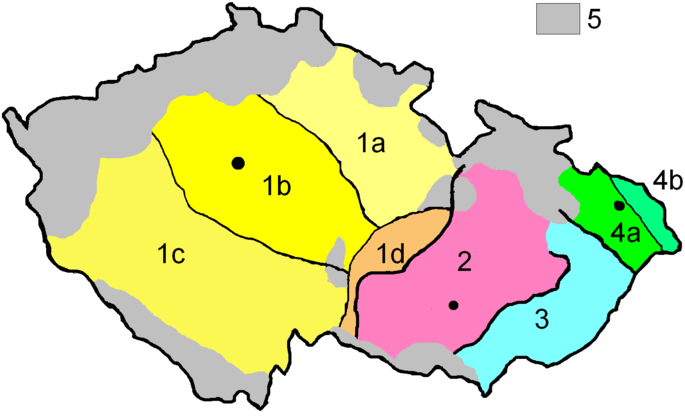 Dialects of Czech-Moravian: (yellow) [Proper] Czech dialects (pink) Central moravian dialects (blue) Eastern moravian dialects (green) Lašsko dialects.